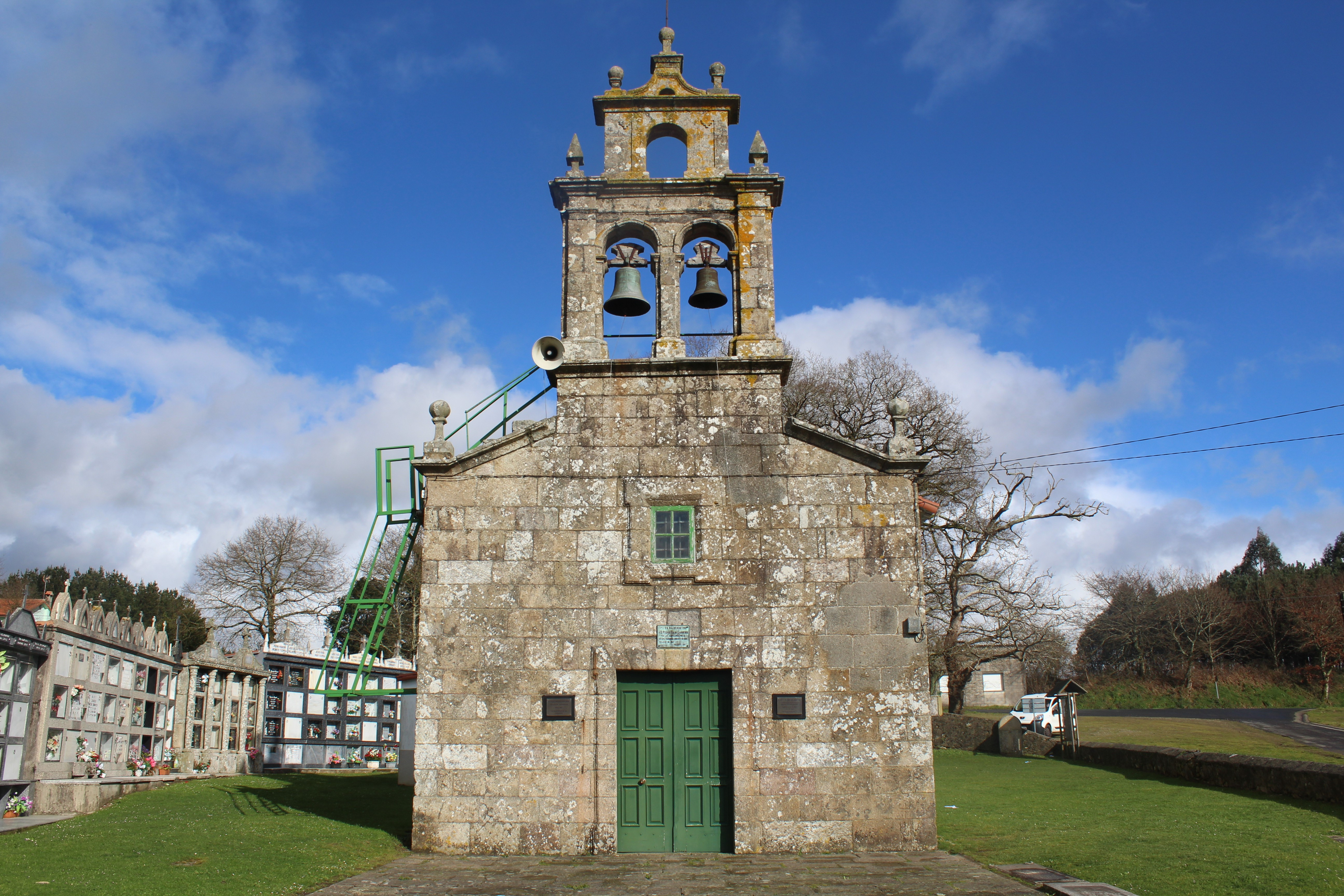 Igrexa de Santo Estevo, no lugar da Cruz do monte.